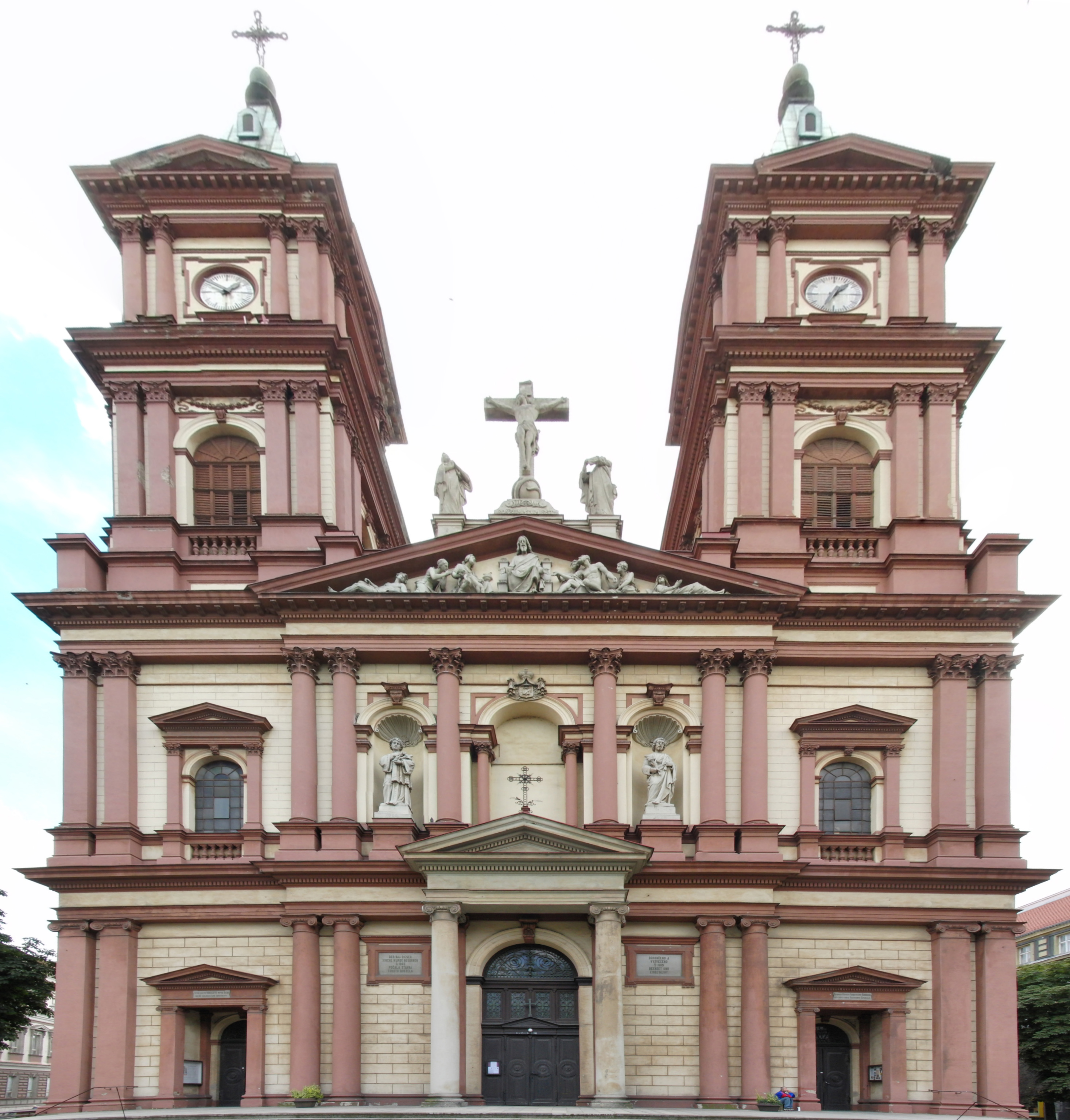 čelní stěna Katedrály Božského Spasitele v Ostravě.